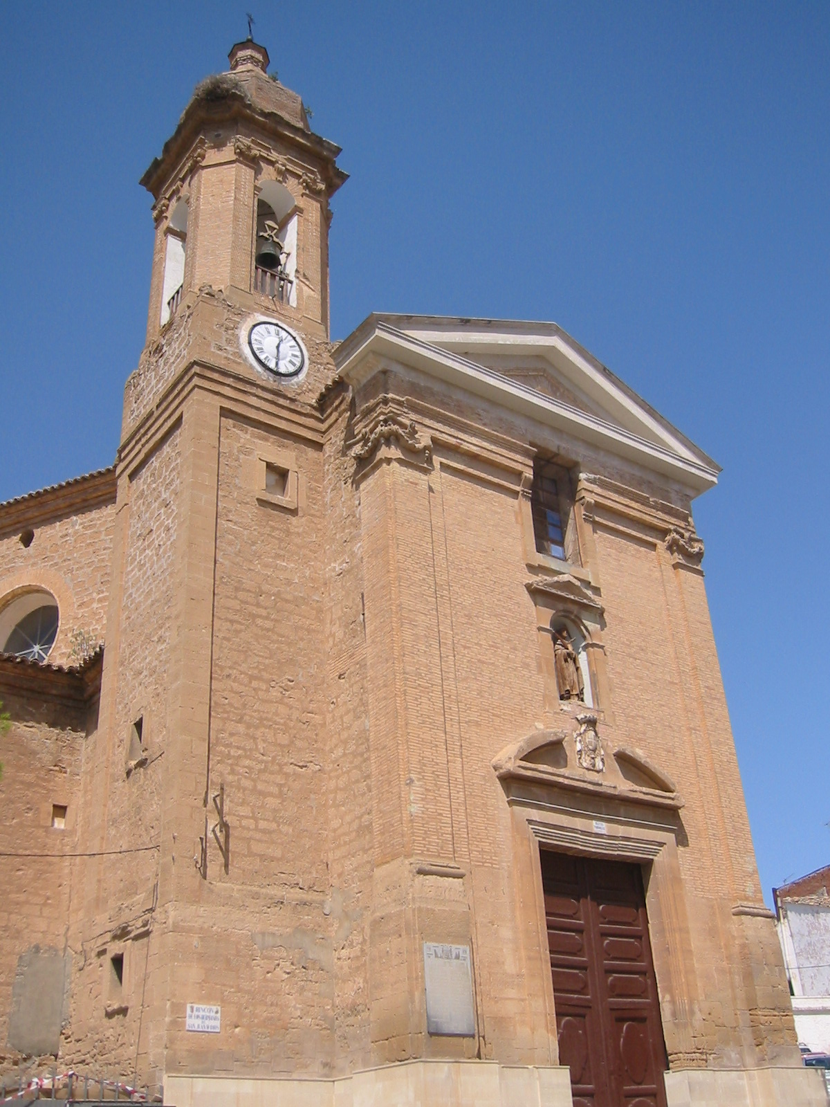 Iglesia Parroquial de San Pedro Mártir, Urrea de Gaén (Teruel), Spain. Autor: Rubén Pamplona